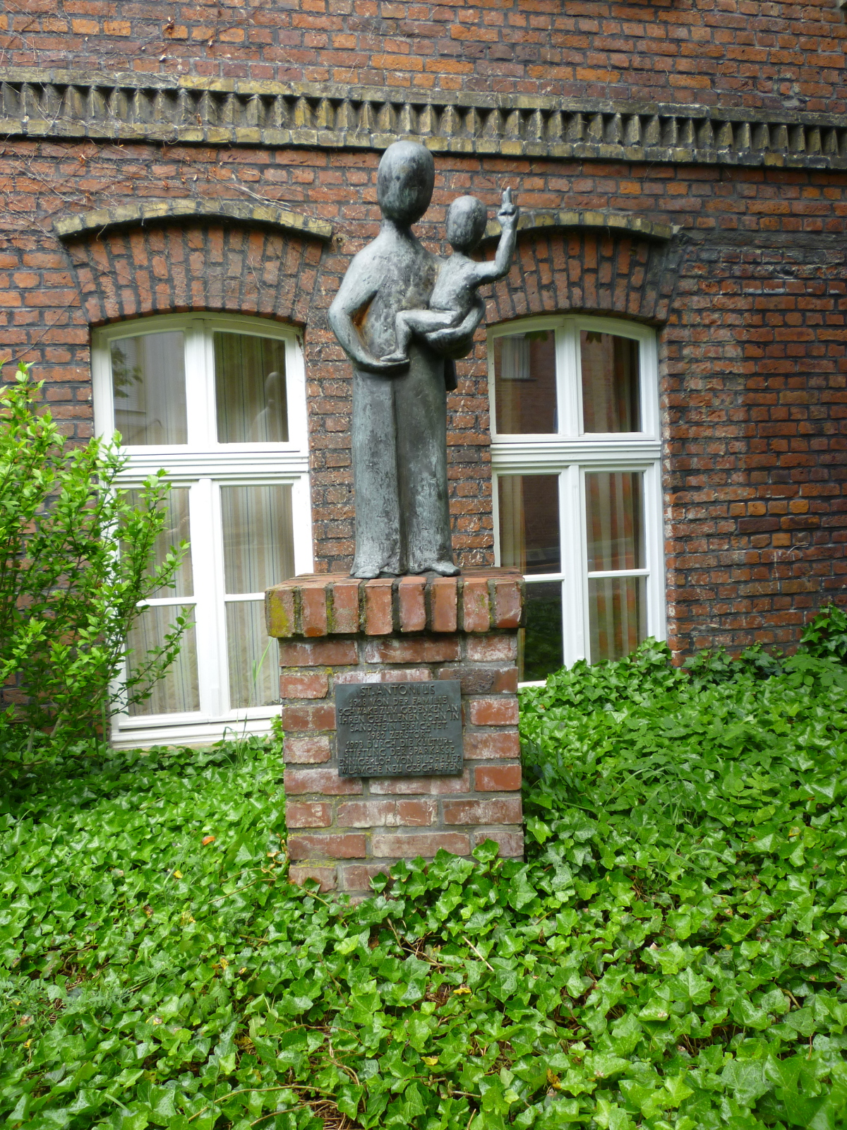 Denkmal St. Antonius bei der alten Brennerei Schwake in Ennigerloh